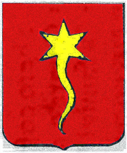 Brasão dos Rossi da Sicília, descrito por Gravina: "Di rosso, con una cometa d'oro, ondeggiante in pala. Corona di principe. Moto: Serenat". Reconstrução moderna.